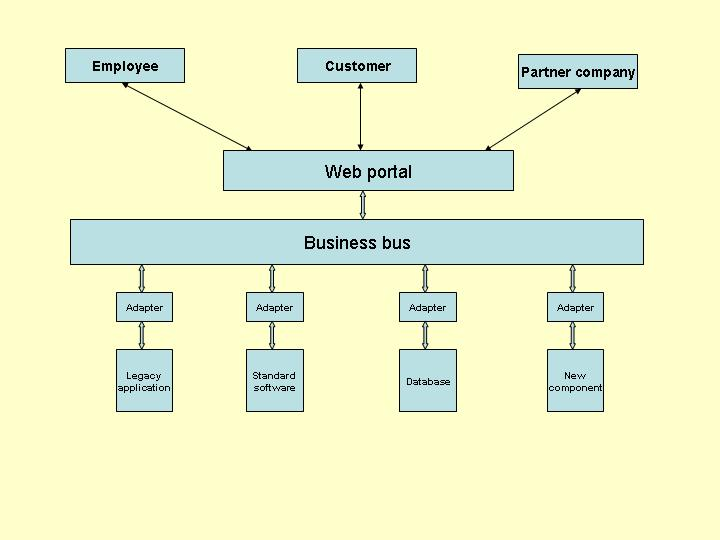 Hình minh họa EAI (tự vẽ)